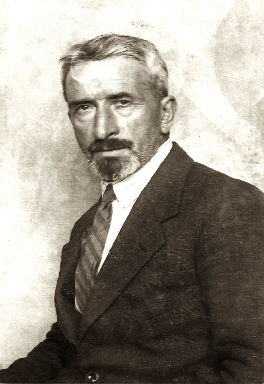 El pintor academicista y catedrático de dibujo Joaquín Bárbara y Balza, retratado poco antes de su repentino fallecimiento en Santander.